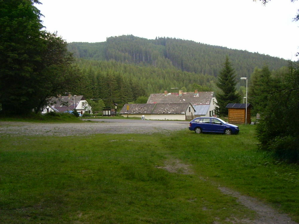 Das Dorf Jeleni Vrchy / Hirschbergen